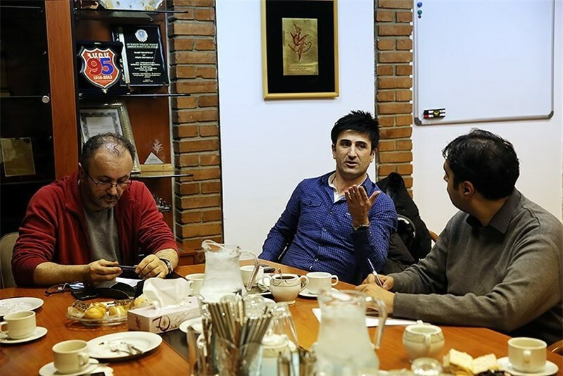 ورزشگاه آرارات